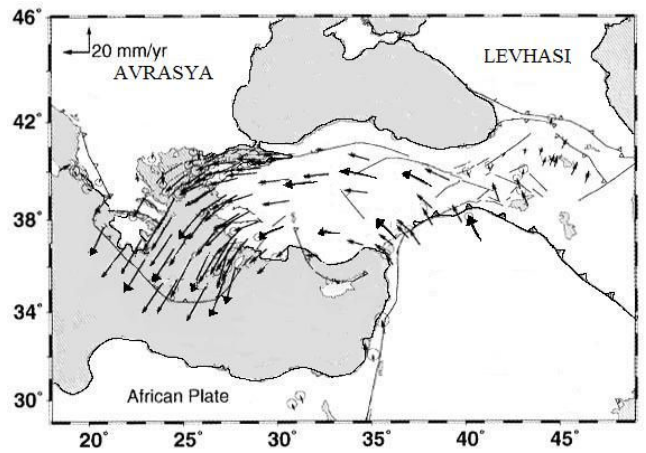 GPS ölçümlerine göre Anadolu levhası’nın günümüzdeki hareket yönü